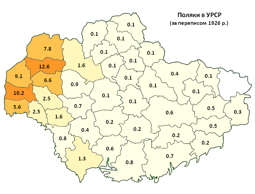 Розселення поляків в УРСР за даними перепису 1926 р. / Poles in Ukrainian SSR according to 1926 census